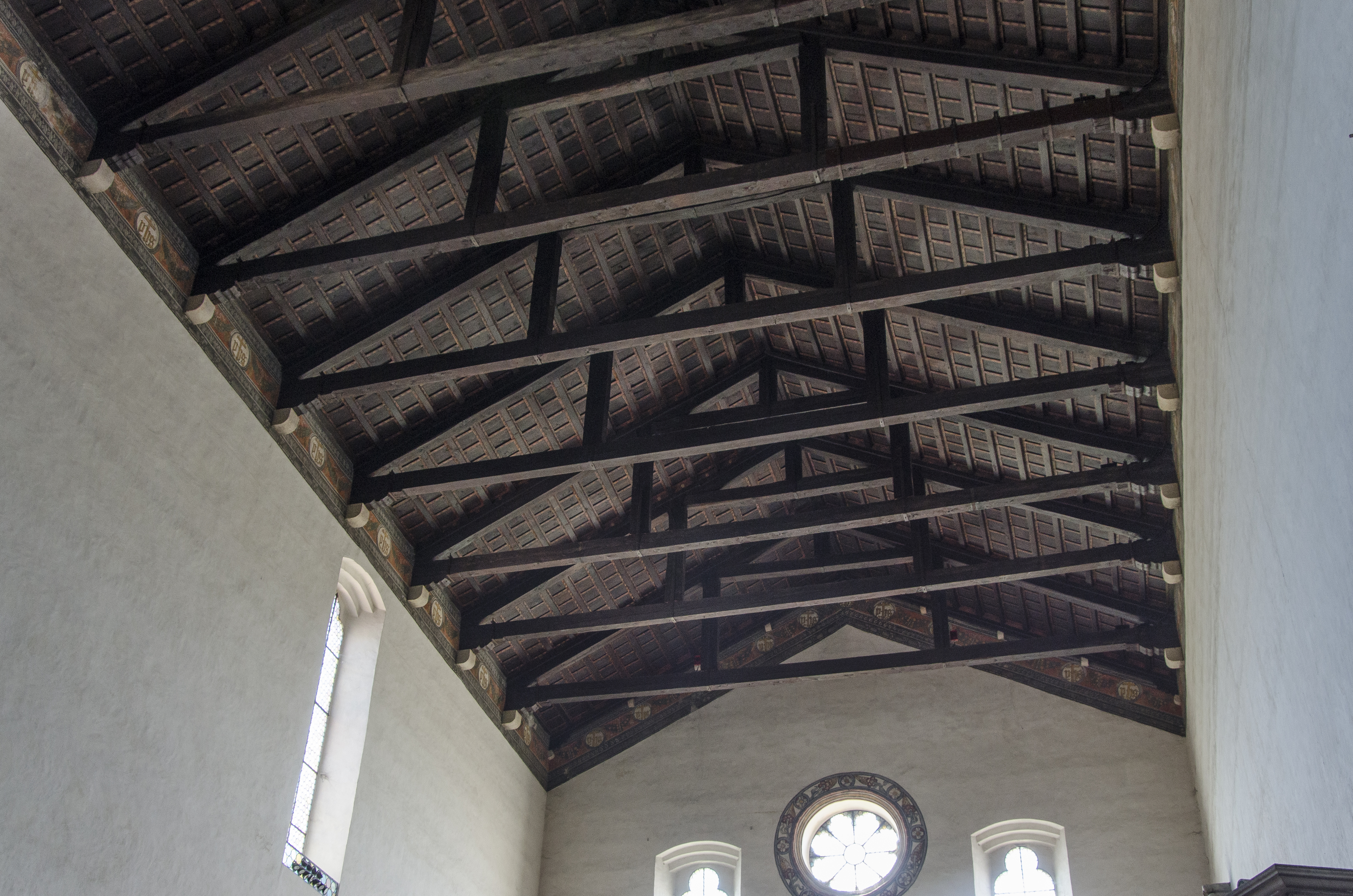 Chiesa di San Bernardino a Verona